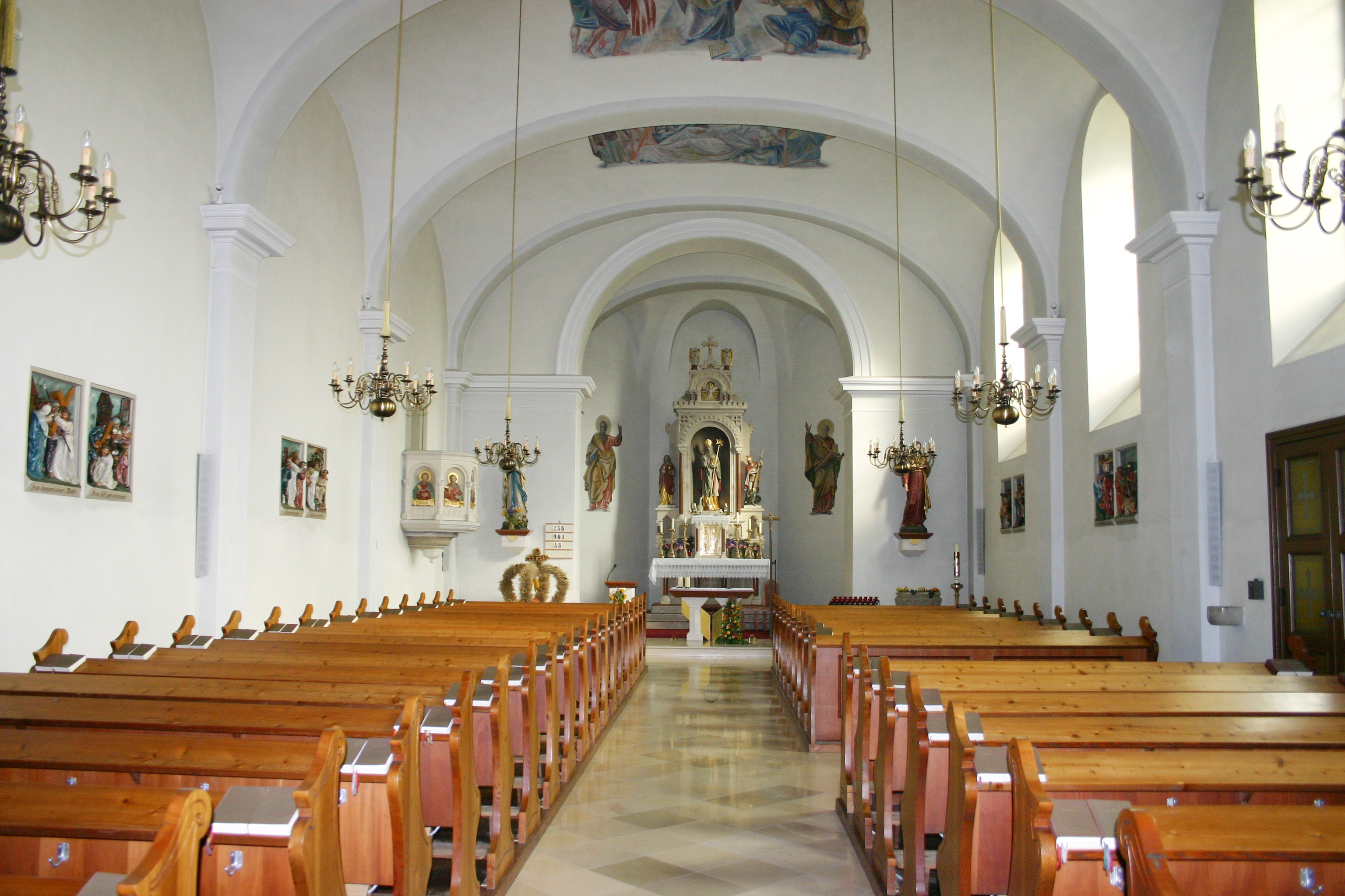 Markt Sankt Martin - Innenansicht der römisch-katholischen Pfarrkirche